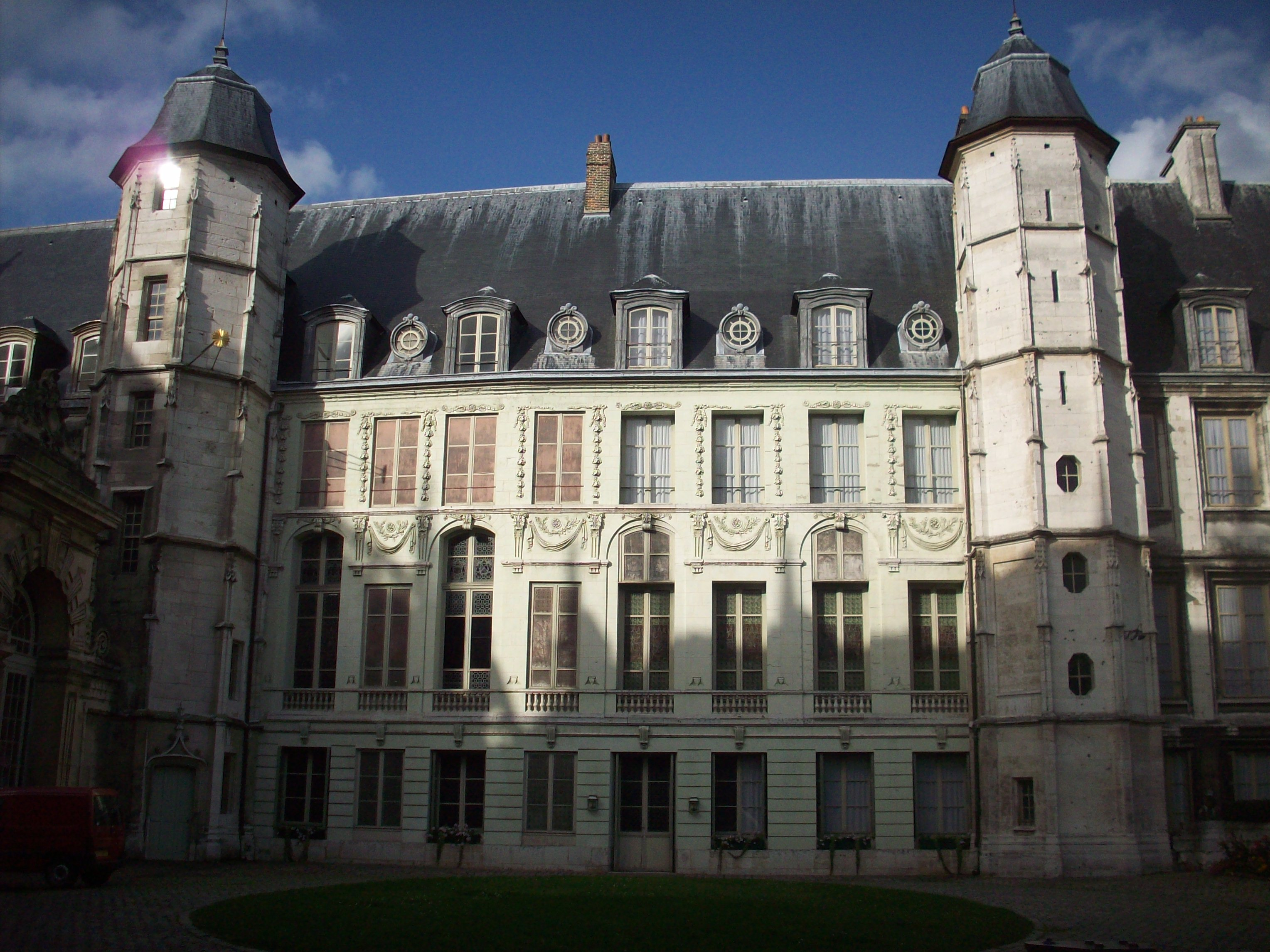 Façade sur la cour d'honneur de l'archevêché.